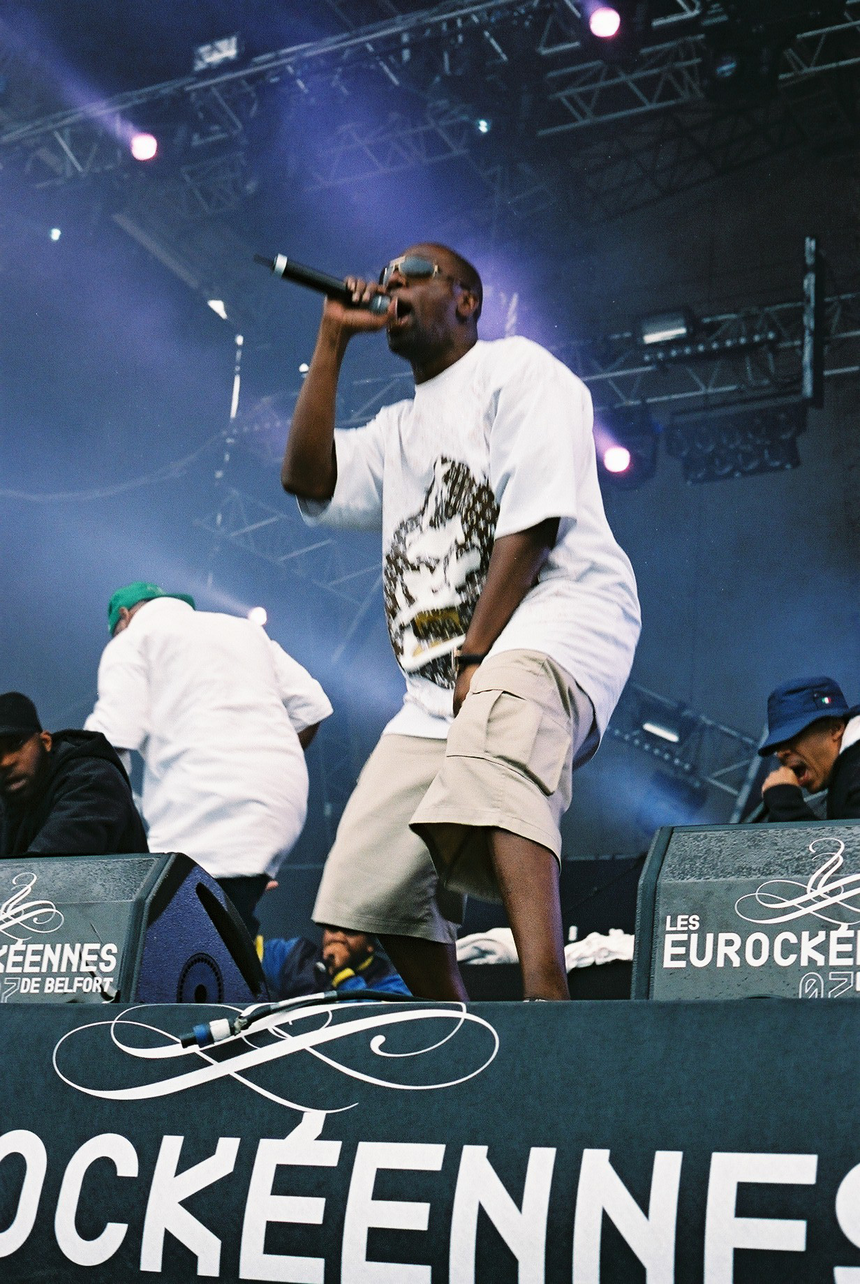 Wu-Tang Clan - Eurockéennes 07 PL: Insectah Deck podczas wystepu w 2007 roku